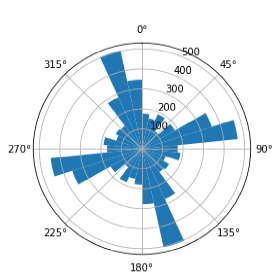 Diagram znázorňuje geografickou orientaci ulic v Pardubicích.